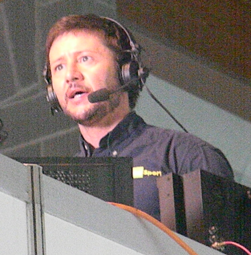 Il giornalista Tommaso Mecarozzi a Riccione